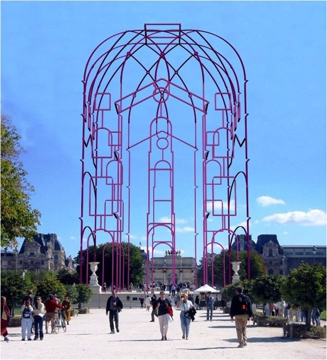 Tour Centrale Palais des Tuileries